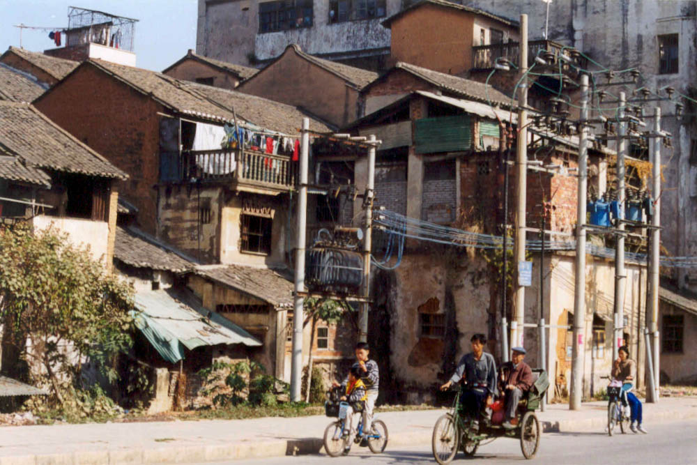 peter j freund, 15 january 2000